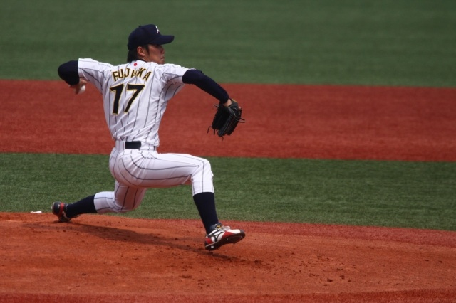 2010年 日本開催 第５回 世界大学野球 日本代表 藤岡貴裕 投手 背番号17 東洋大学３年